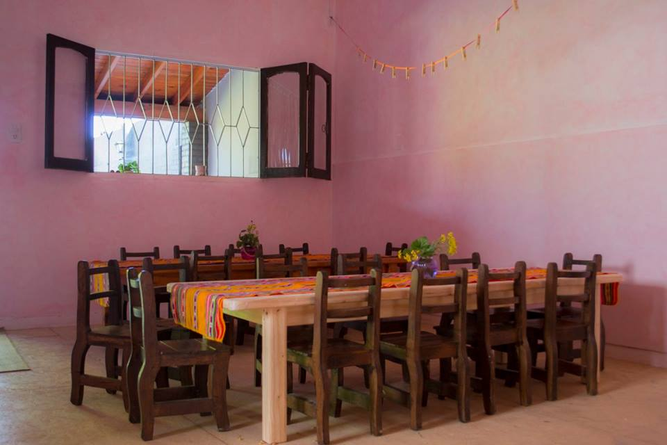 Mesas de trabajo en jardín de infantes Waldorf, Santiago del Estero, Argentina